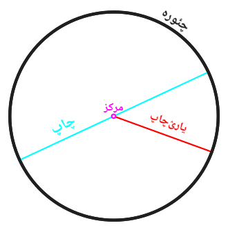 تۆرکجه: دایره شکلی